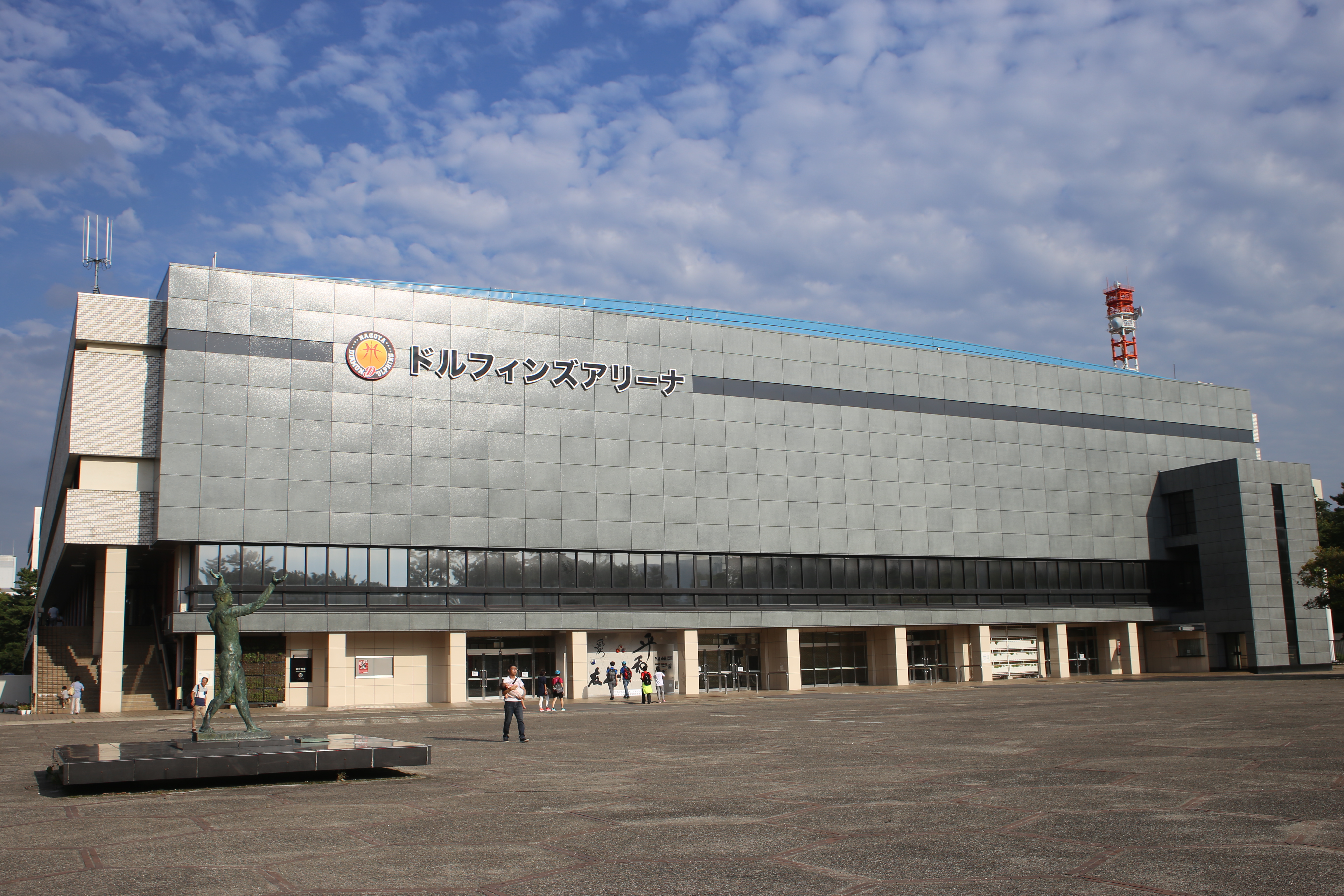 名古屋市中区二の丸の愛知県体育館（ドルフィンズアリーナ）